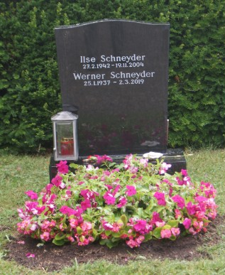 Grab Werner Schneyder-Wiener Zentralfriedhof